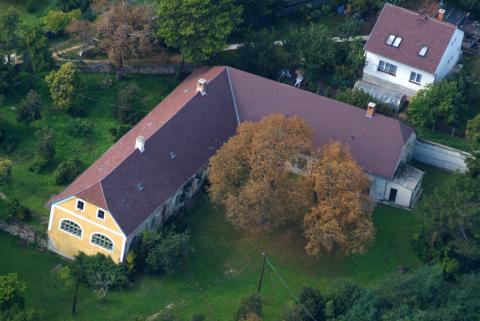 Felsőörs, Hungary, aerialphotography